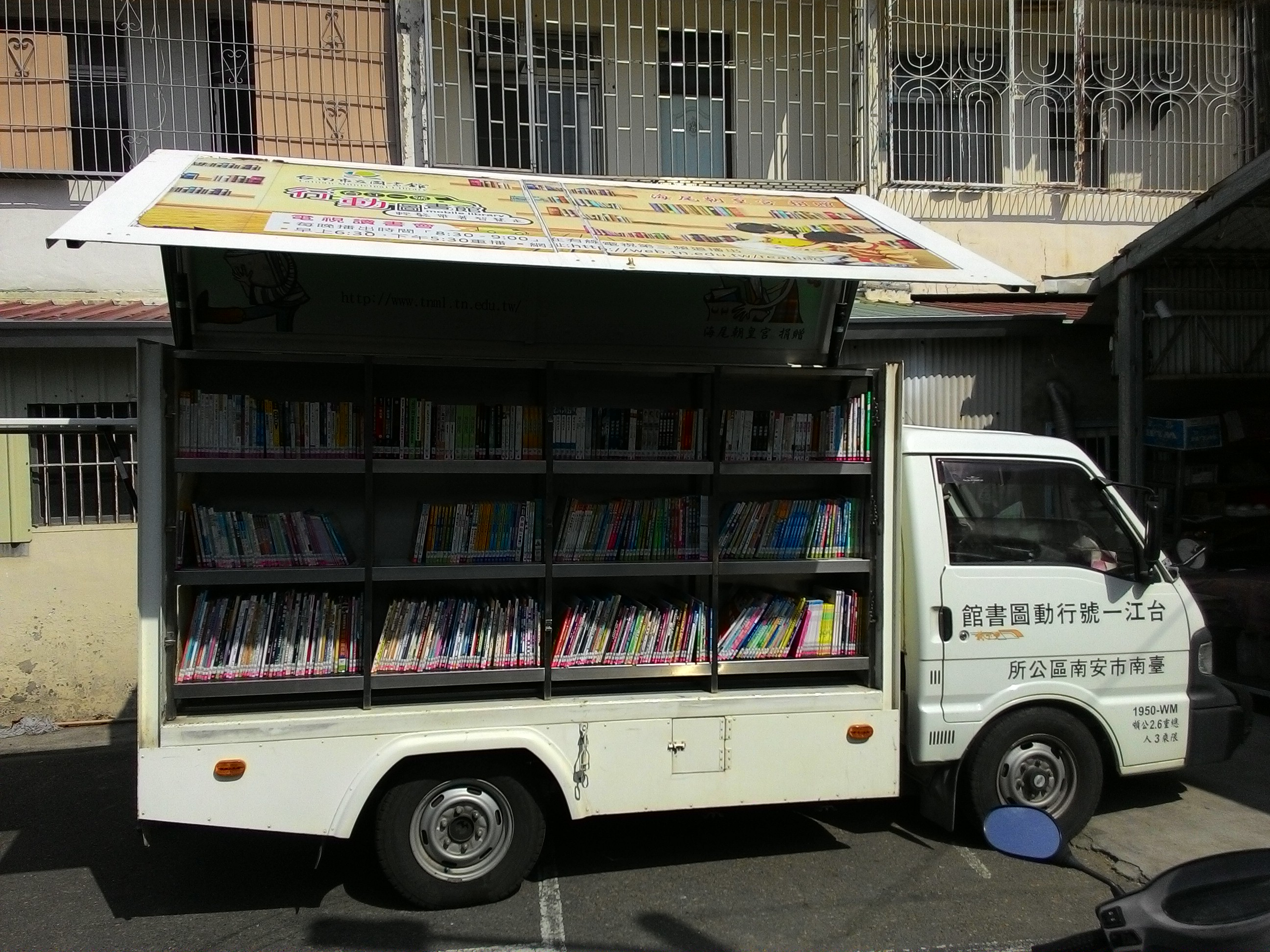 中文（台灣）: 台江一號行動圖書館，臺南市公共圖書館福特載卡多行動圖書車1950-WM，臺南市安南區公所建置，停靠安南區新寮鎮安宮。